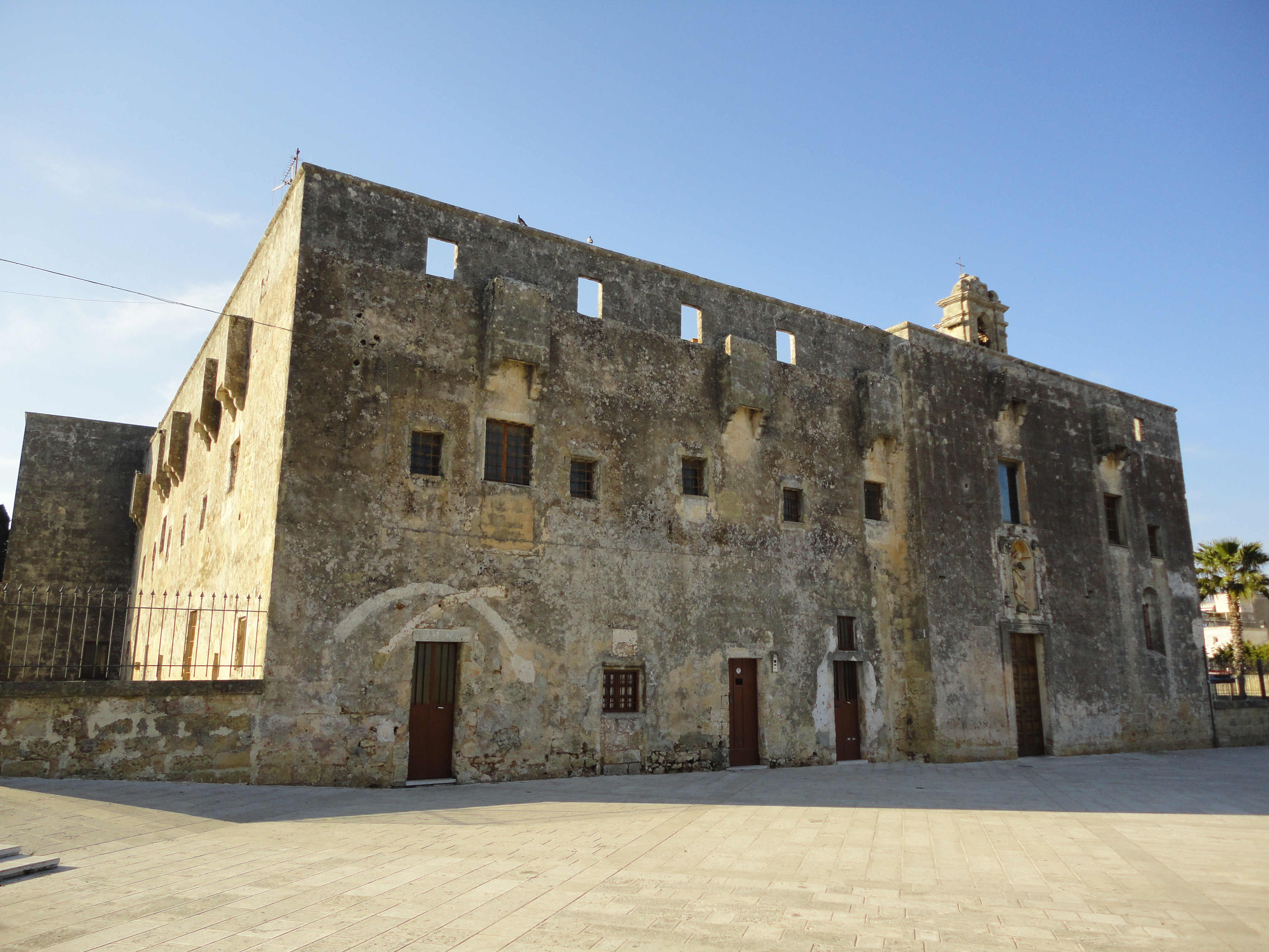 Convento dei Cappuccini Tricase, Lecce